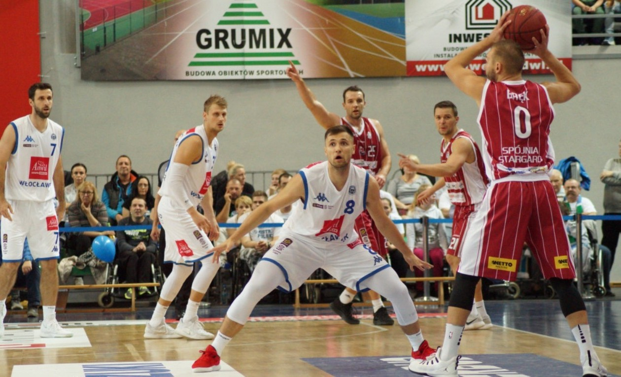 Marcel Wilczek w meczu z Anwilem Włocławek